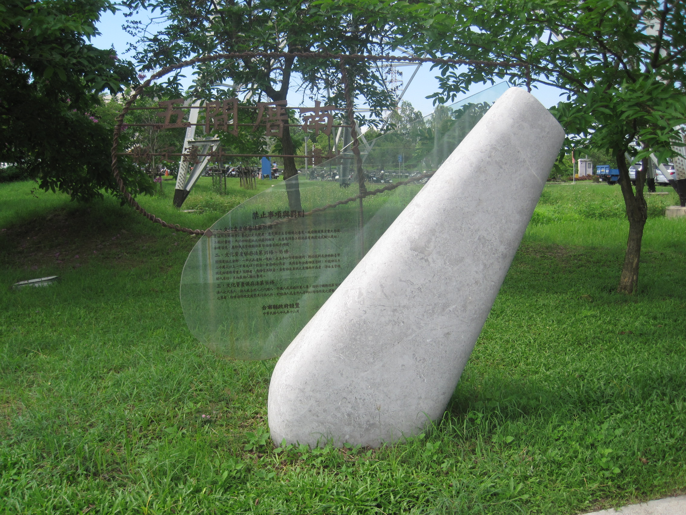 五間厝南遺址意象